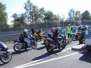 Eingang zur grünen Hölle